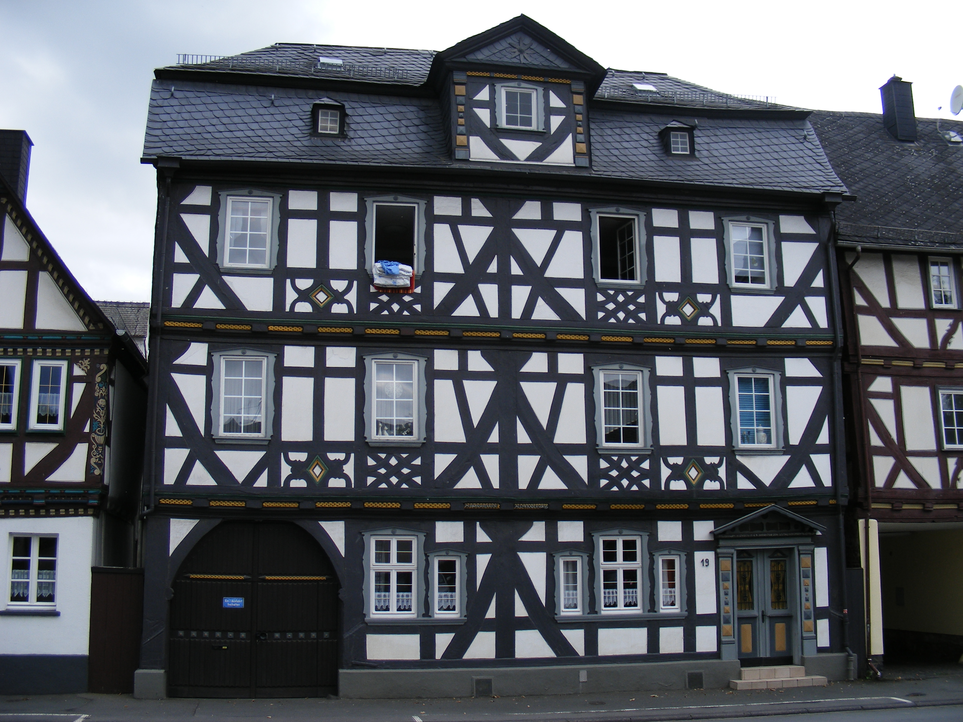 Leun Limburger 19